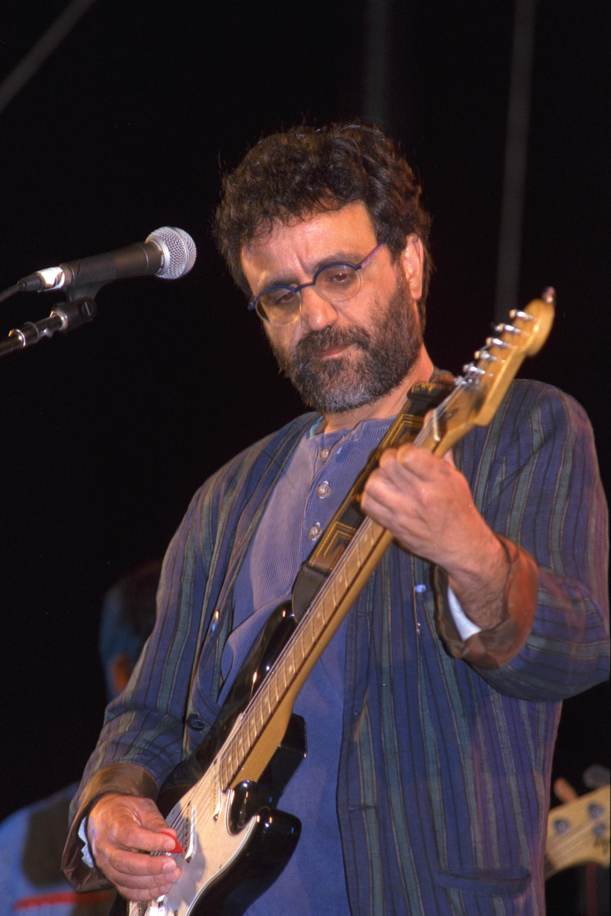 Singer Ehud Banai performing at the Students Day held at the Hebrew University of Jerusalem. אהוד בנאי מופיע ביום הסטודנט של האוניברסיטה העברית בירושלים Photo: EINAT ANKER, 05/21/1997